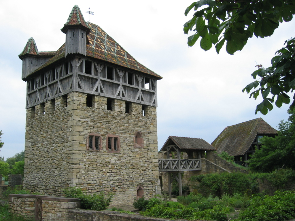 Ecomusée d'Alsace